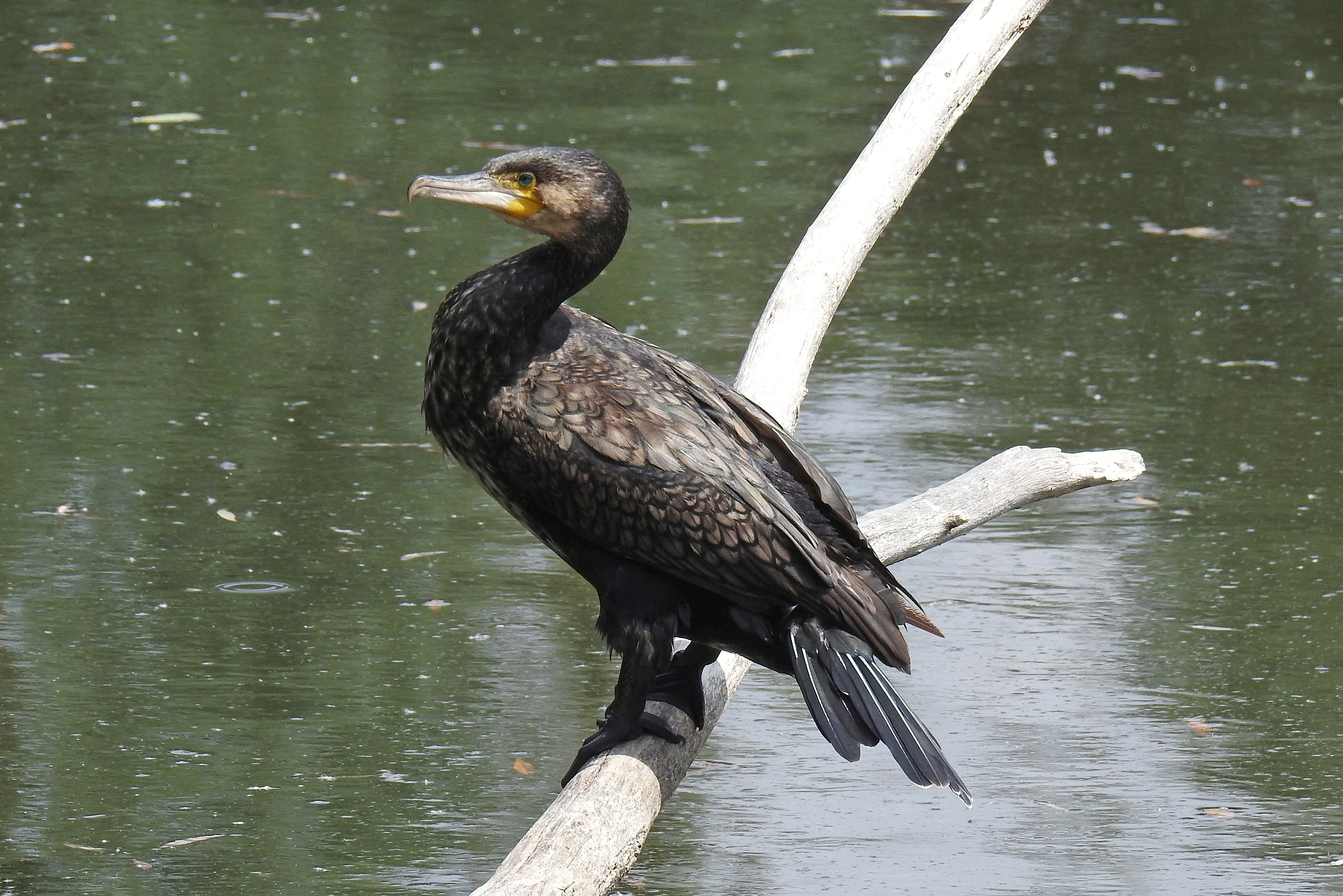 Kormoran auf dem Aradosee in Potsdam